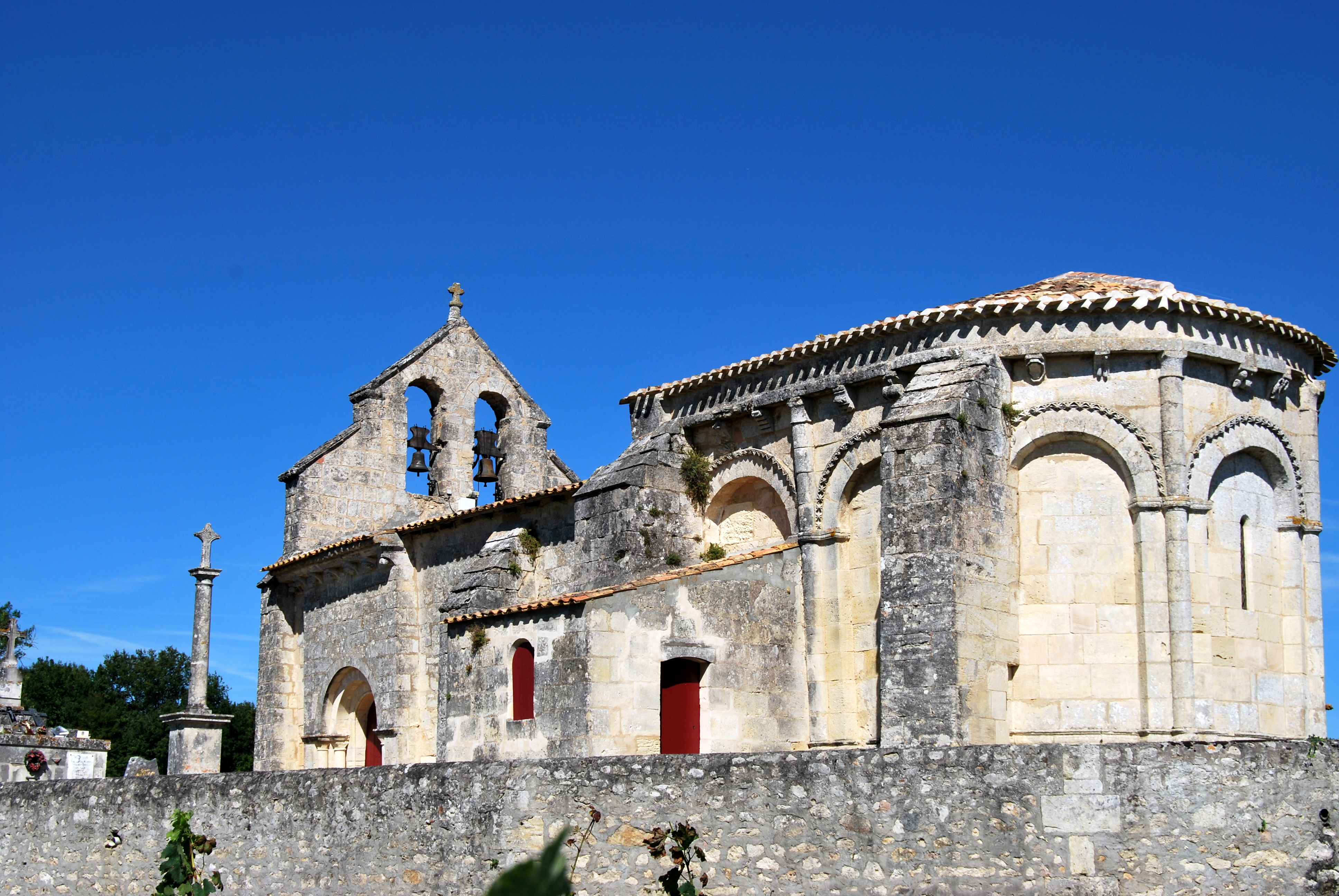 Église Saint-Fort de Mouillac .